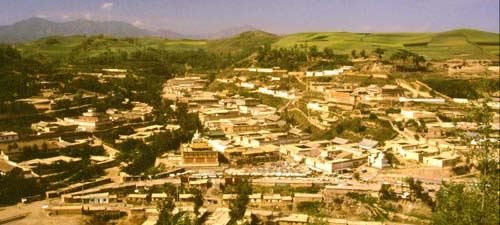 Panoramic view of Kumbum Monastery in Amdo